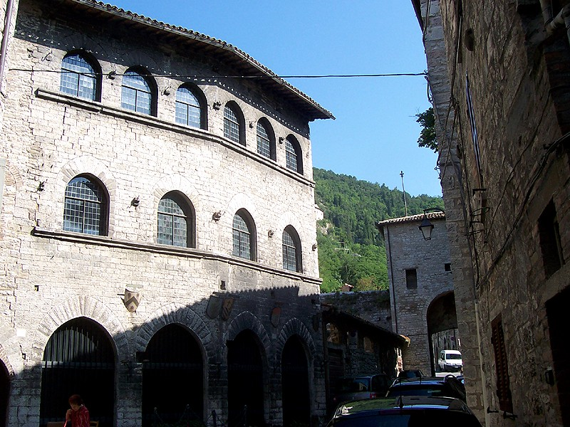 Gubbio - Palazzo del Capitano del Popolo